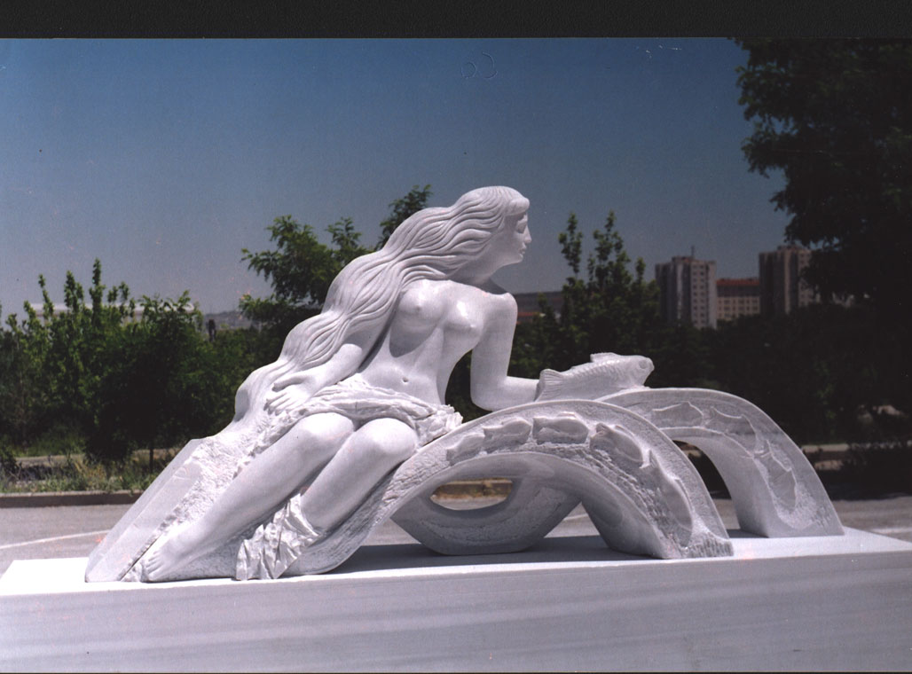 Парковая скульптура "Венера"